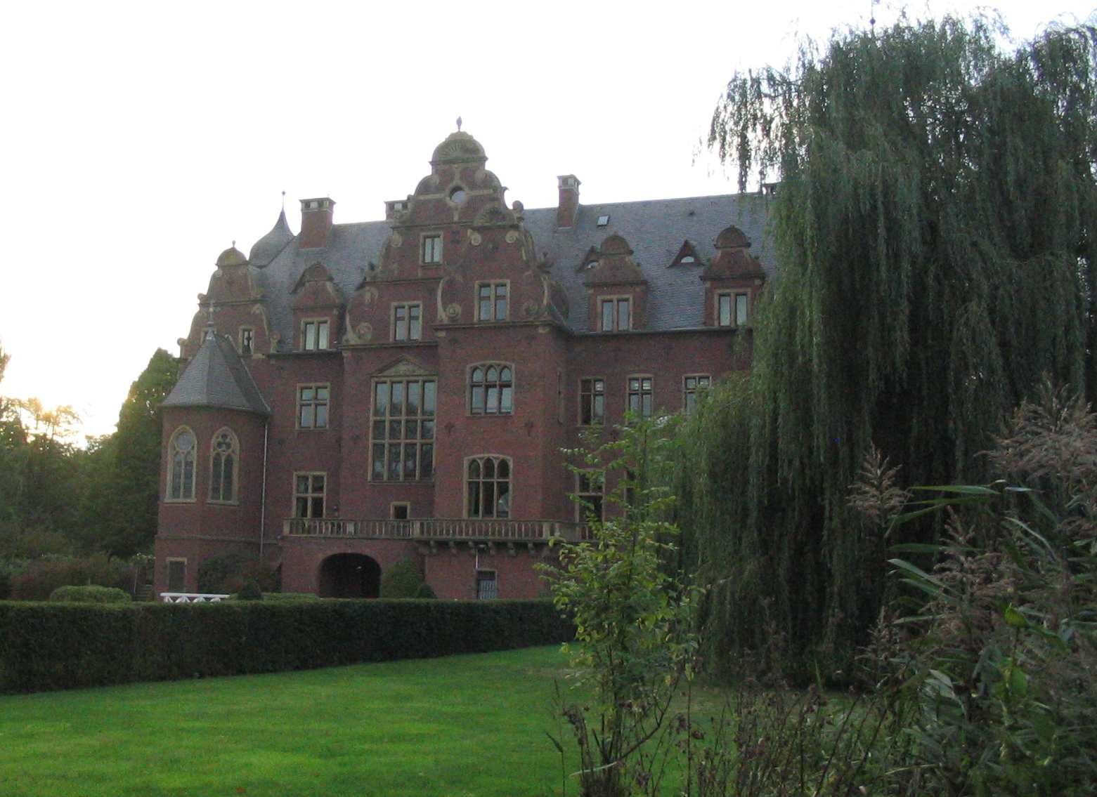 Schloß Krickenbeck, Parkseite